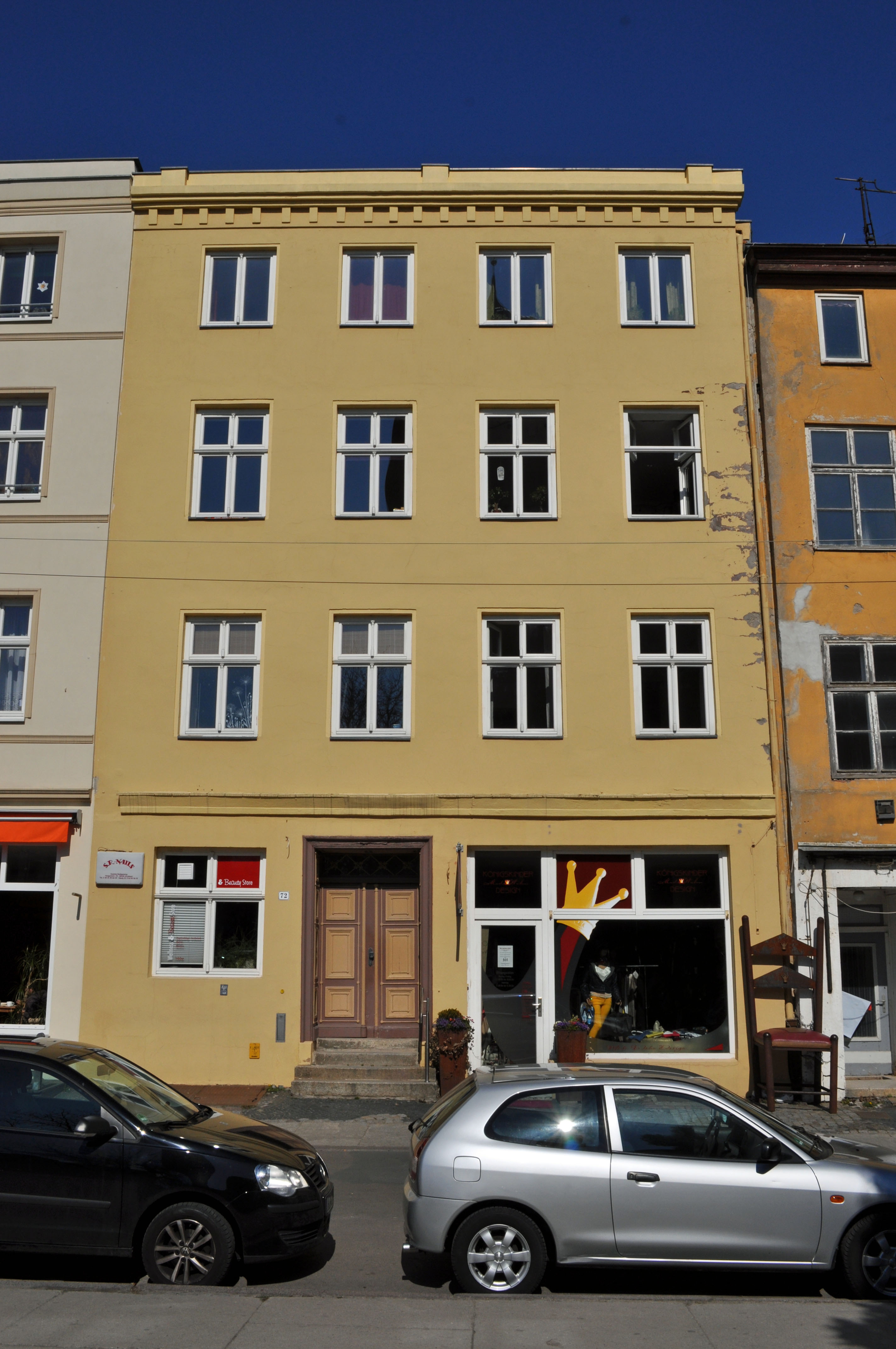 Gebäude bzw. Gebäudedetail in Stralsund. Straße und Hausnummer siehe Dateiname.